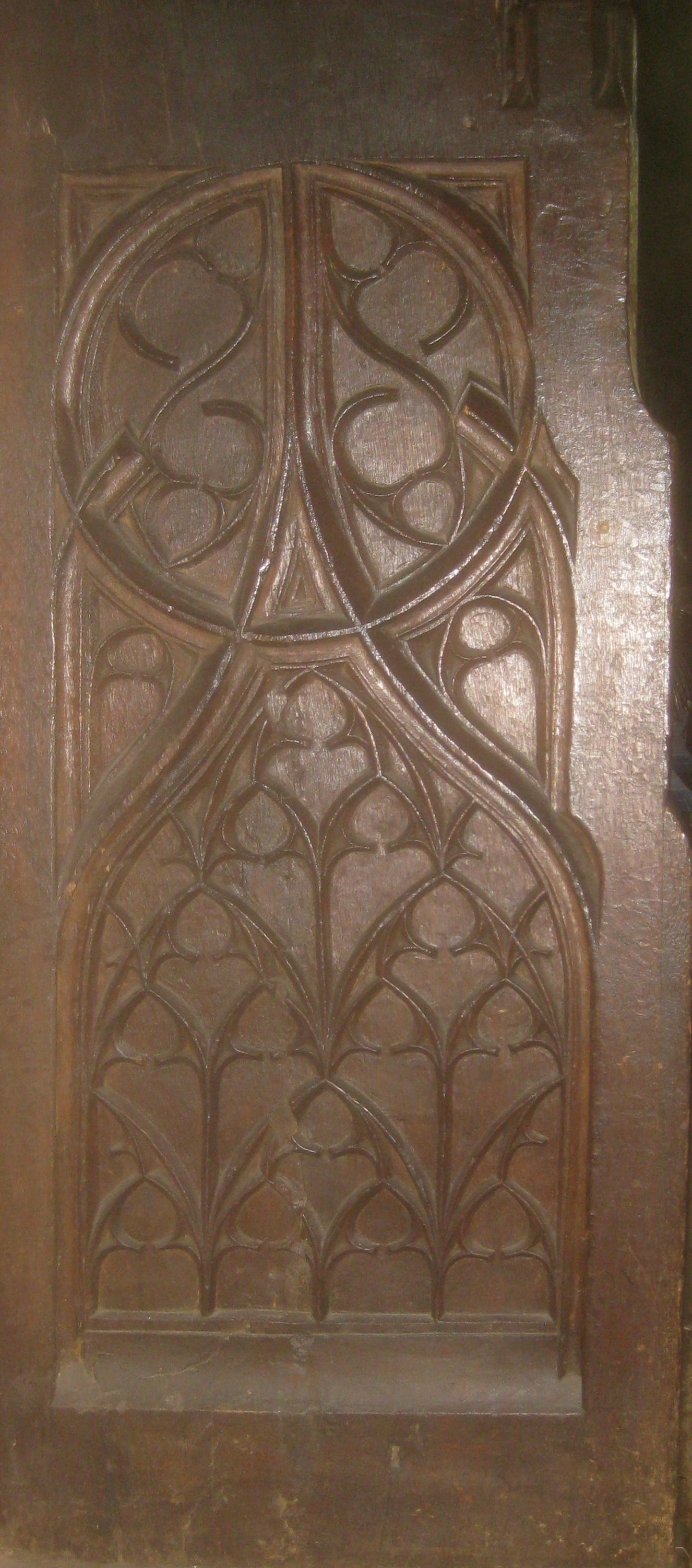 Chorgestühl der Leonhardskirche, Südostfassade, vordere Sitzreihe, Untergeschoss der linken Abschlusswange mit einem Maßwerkrelief.